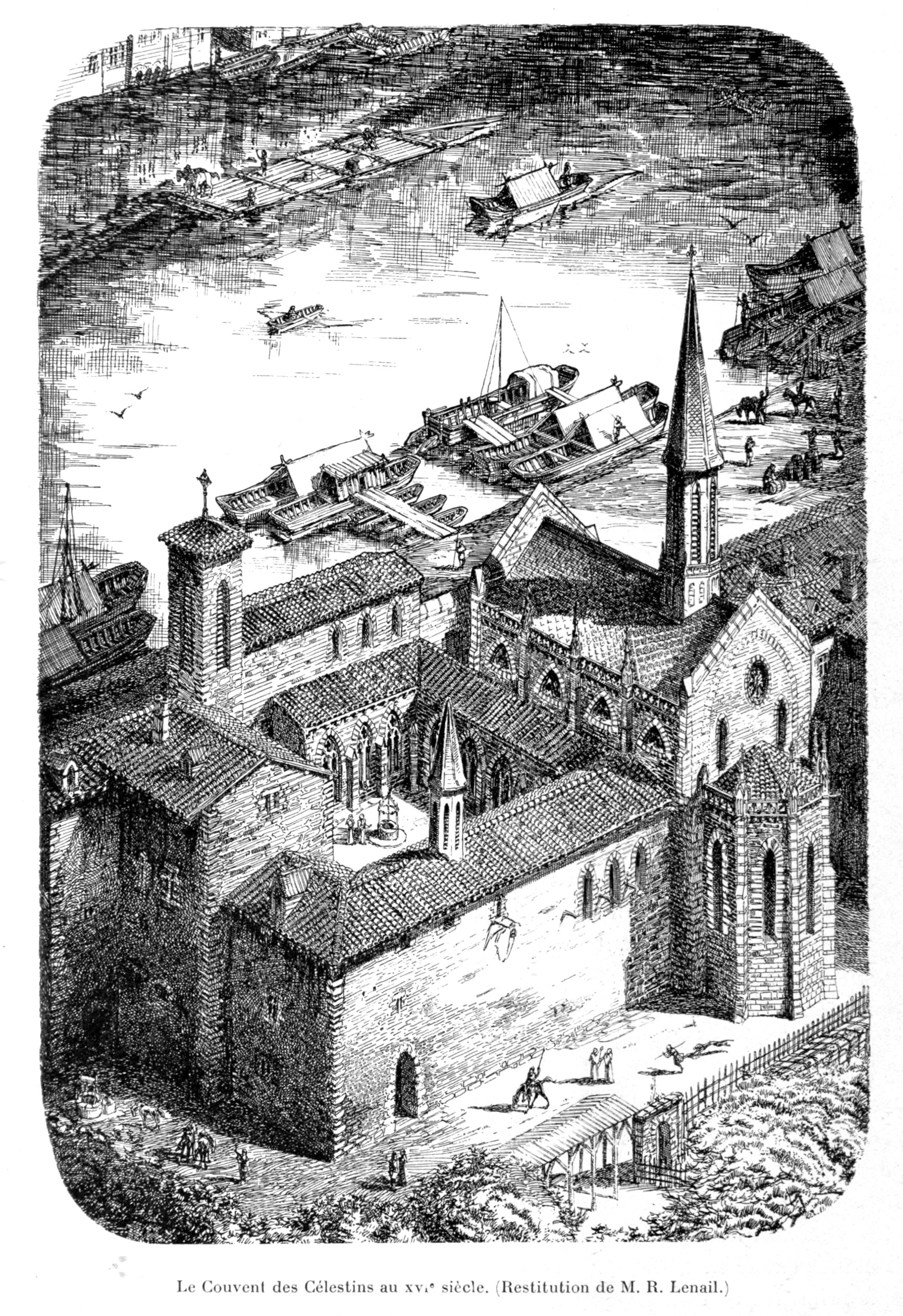 Illustrations pour l'Histoire des églises et chapelles de Lyon